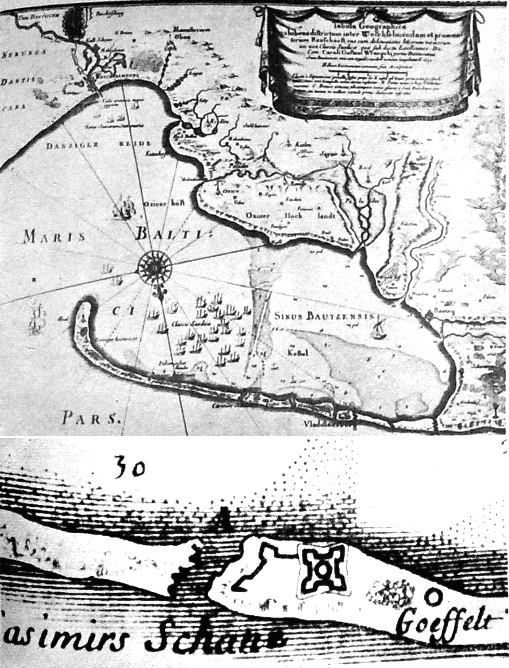 kolaż dwóch fotokopii z książki Ziemia pucka - przeszłość i teraźniejszość • mapa Zatoki Puckiej sporządzona przez szwedzkiego kartografa E. Dahlberga na podstawie mapy F. Getkanta i opublikowana w Norymberdze w 1696 roku w opracowaniu Samuela von Pufendorfa pt. "De rebus de Carolo Gustavo gestis", str. 66, tabl. 8 • poniżej mapy Zatoki - jej fragment, obejmujący część dzisiejszej Mierzei Helskiej (wówczas był to szereg wysp) z czterobastionowym fortem Kazimierzowo (Casimirs Schanz), dziś na obszarze Kuźnicy uwaga: mapę narysowano w konwencji, wg której południe znajduje się u góry arkusza, północ na dole, wschód po lewej, a zachód po prawej